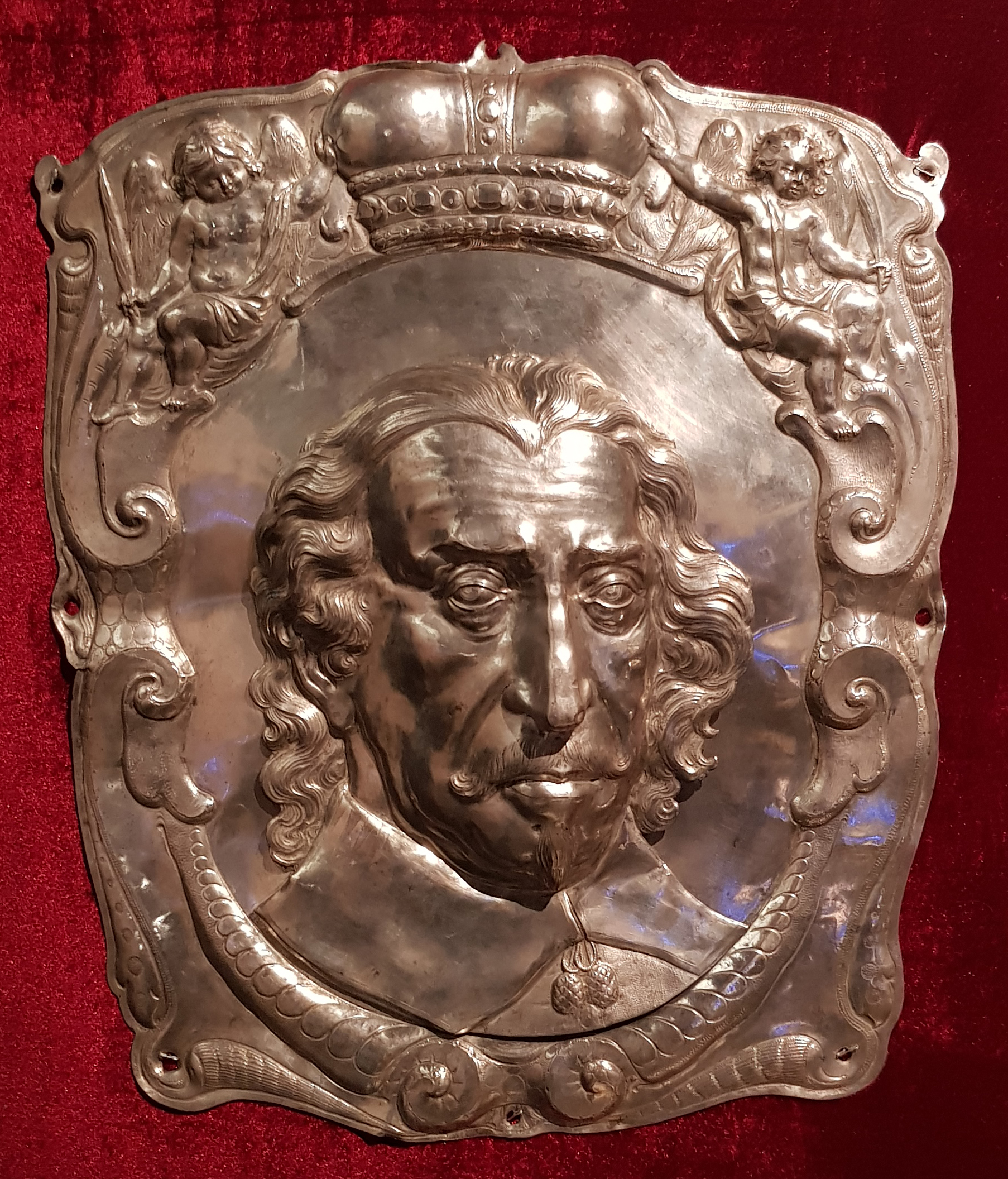 Беларуская (тарашкевіца): Надмагільны партрэт Альбрэхта Станіслава Радзівіла (Albrecht Stanisłaŭ Radzivił) з Калегіяльнага касьцёла ў Алыцы. Захоўваецца ў Валынскім краязнаўчым музэі